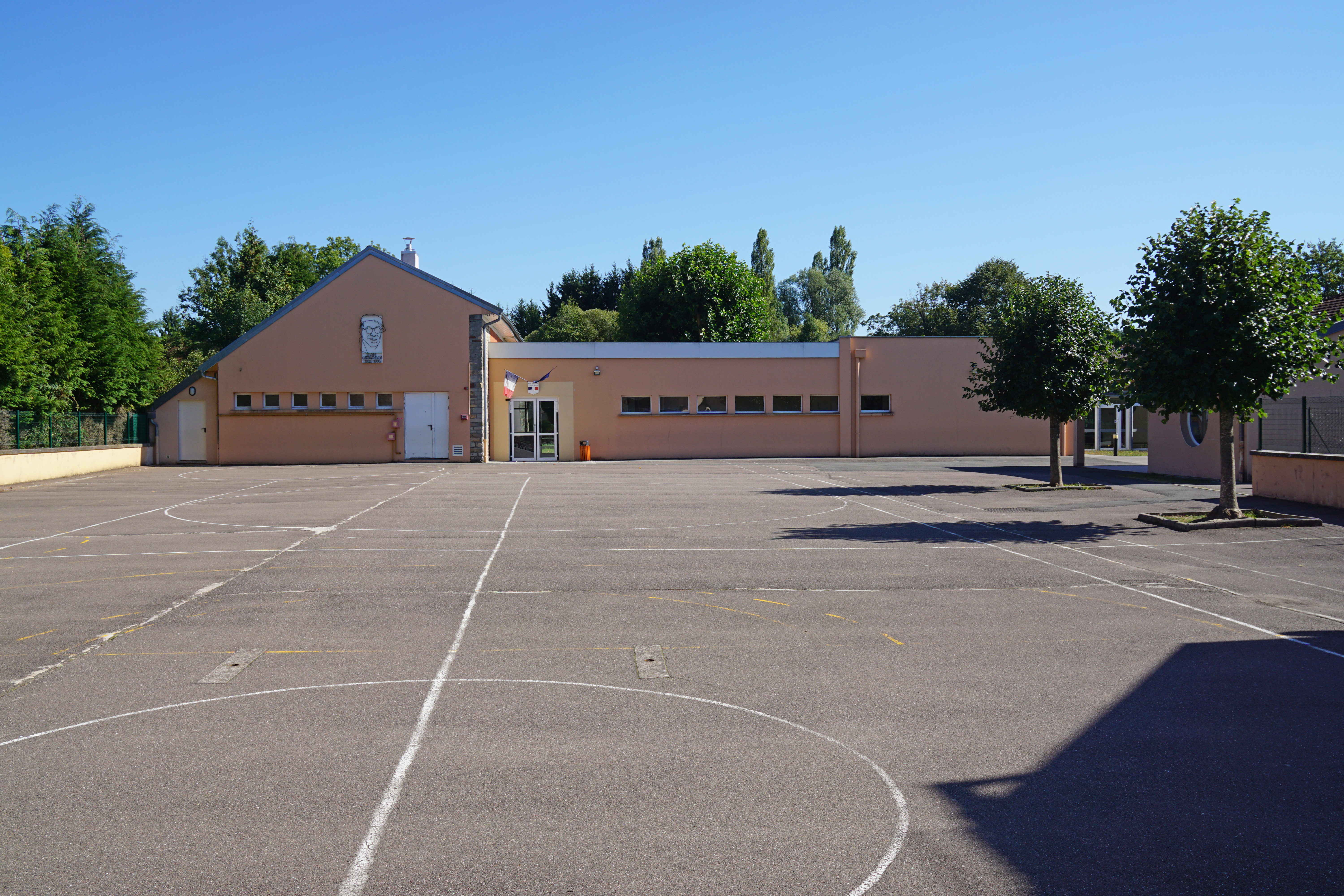 L'école de Magny-Vernois 70.